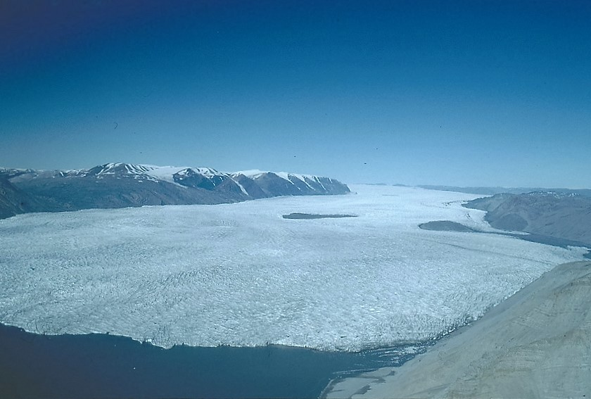 Udsigt nær Kap Kolthoff Kejser Franz Josef Fjord, mod Waltershausen Gletscher View near Kap Kolthoff Kejser Franz Josef Fjord. in background the Waltershausen Gletscher